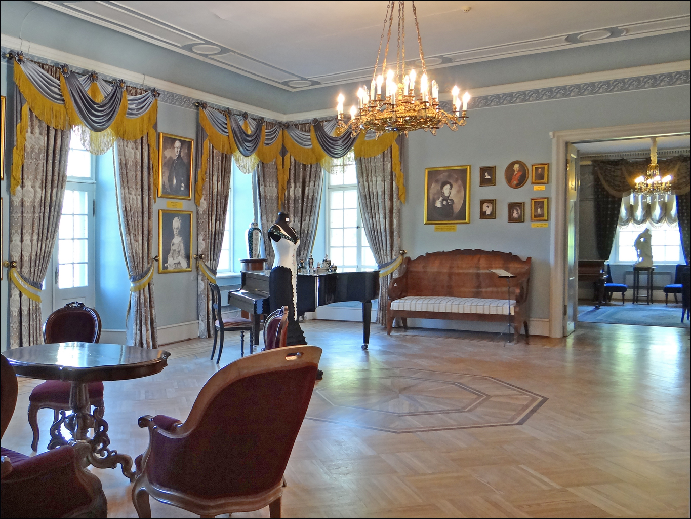 Le grand salon du manoir